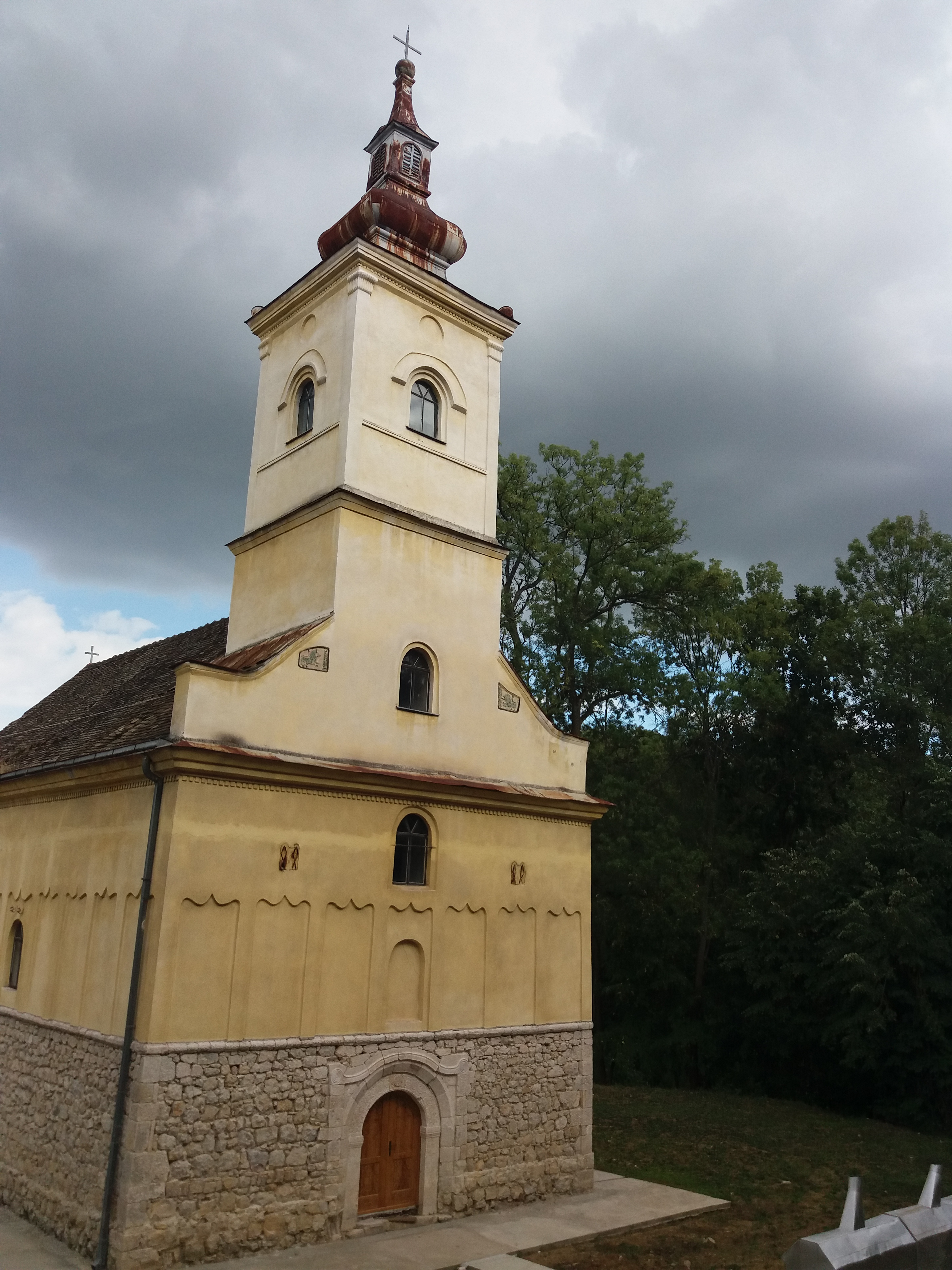 Srpski (latinica): Manastir Pinosava, Kusadak